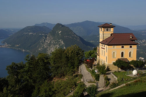 Restaurant auf dem Monte Brè